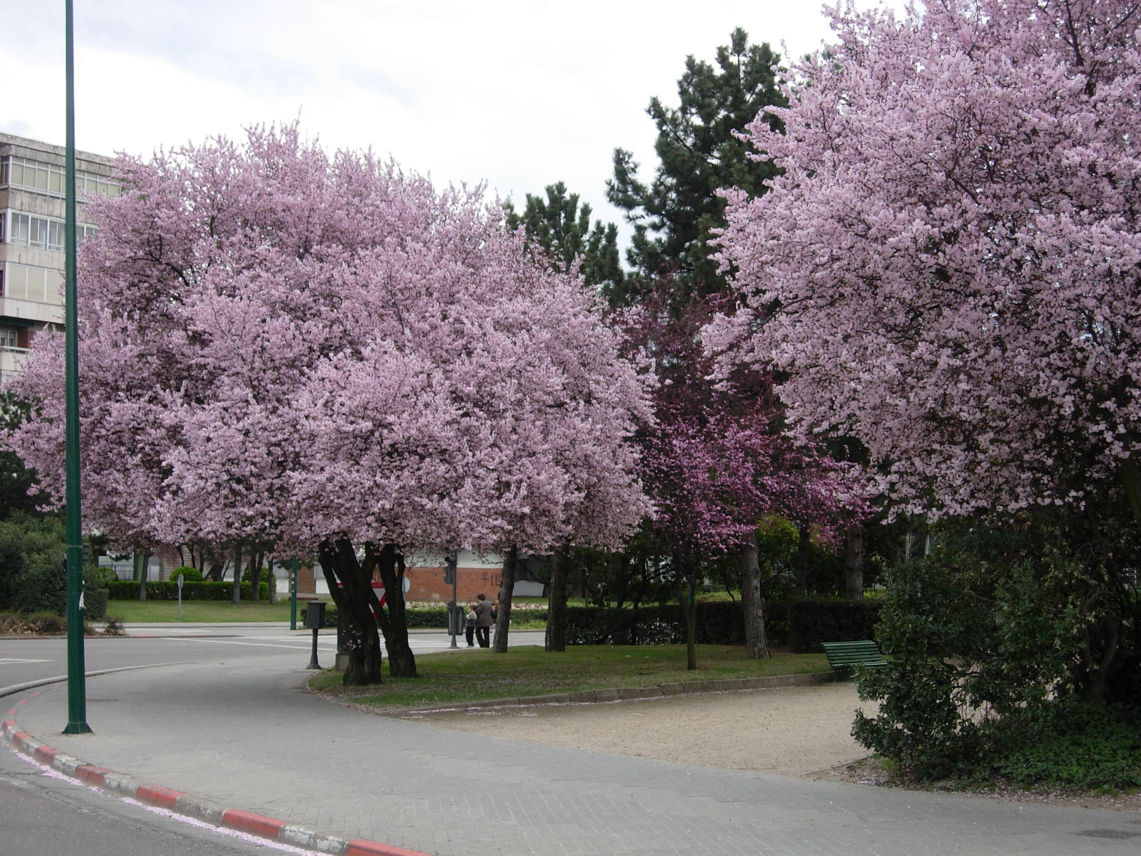 Almendros en flor en la Avenida de Salamanca (Valladolid).